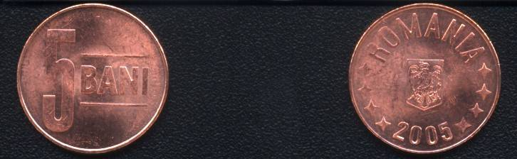 Romanian coin